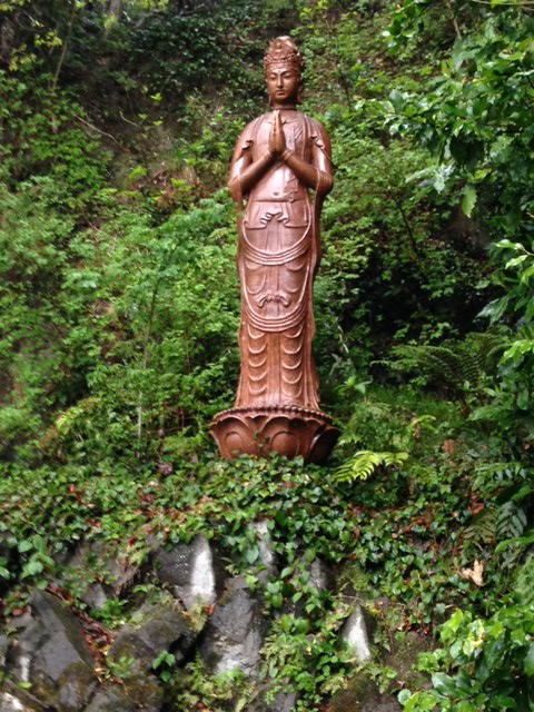 興和観音（熱海、伊豆山）